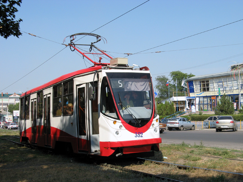 новые трамваи в Таганроге (2007)